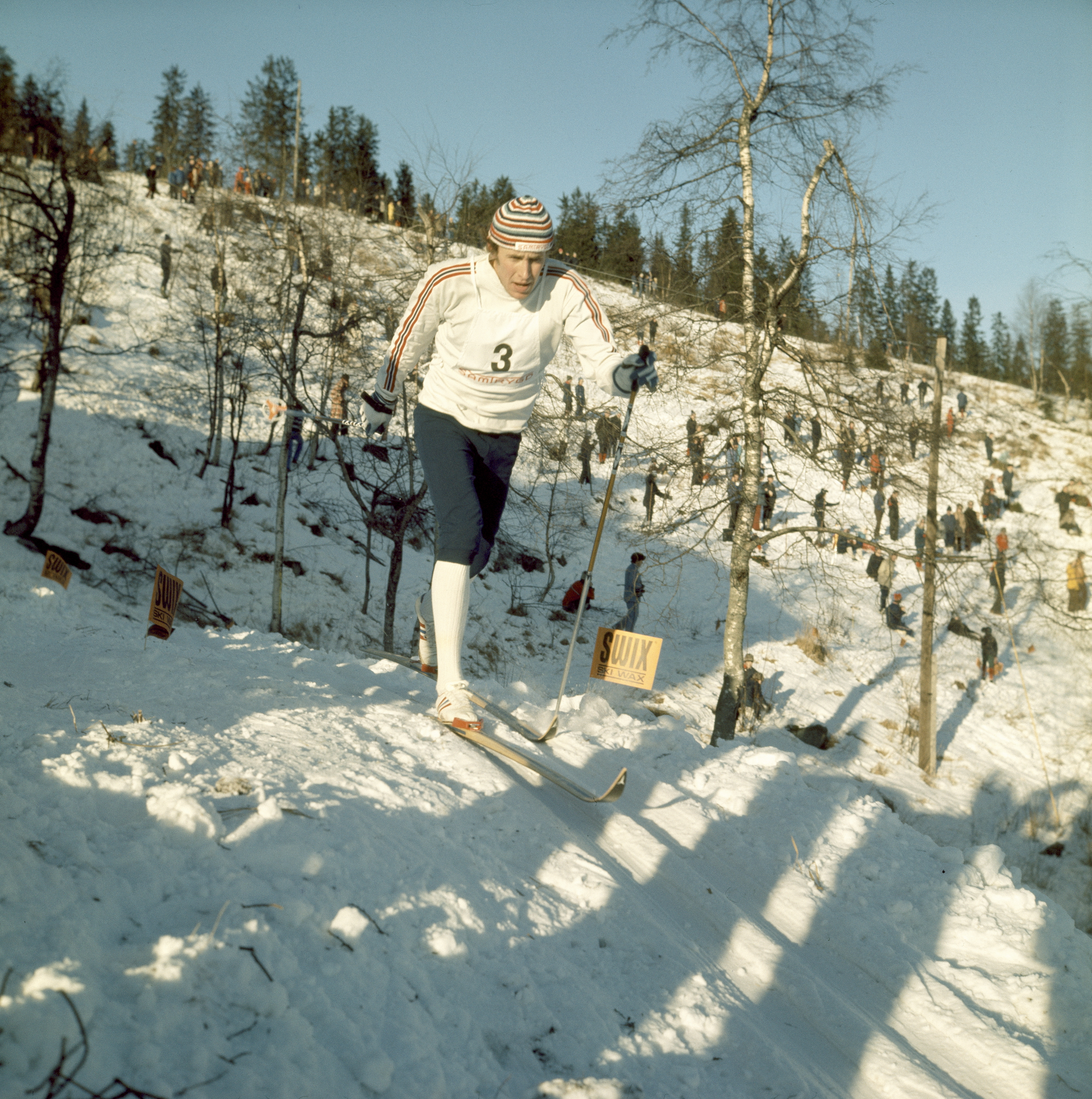 Formo i BUL-sprint. Frognerseteren.